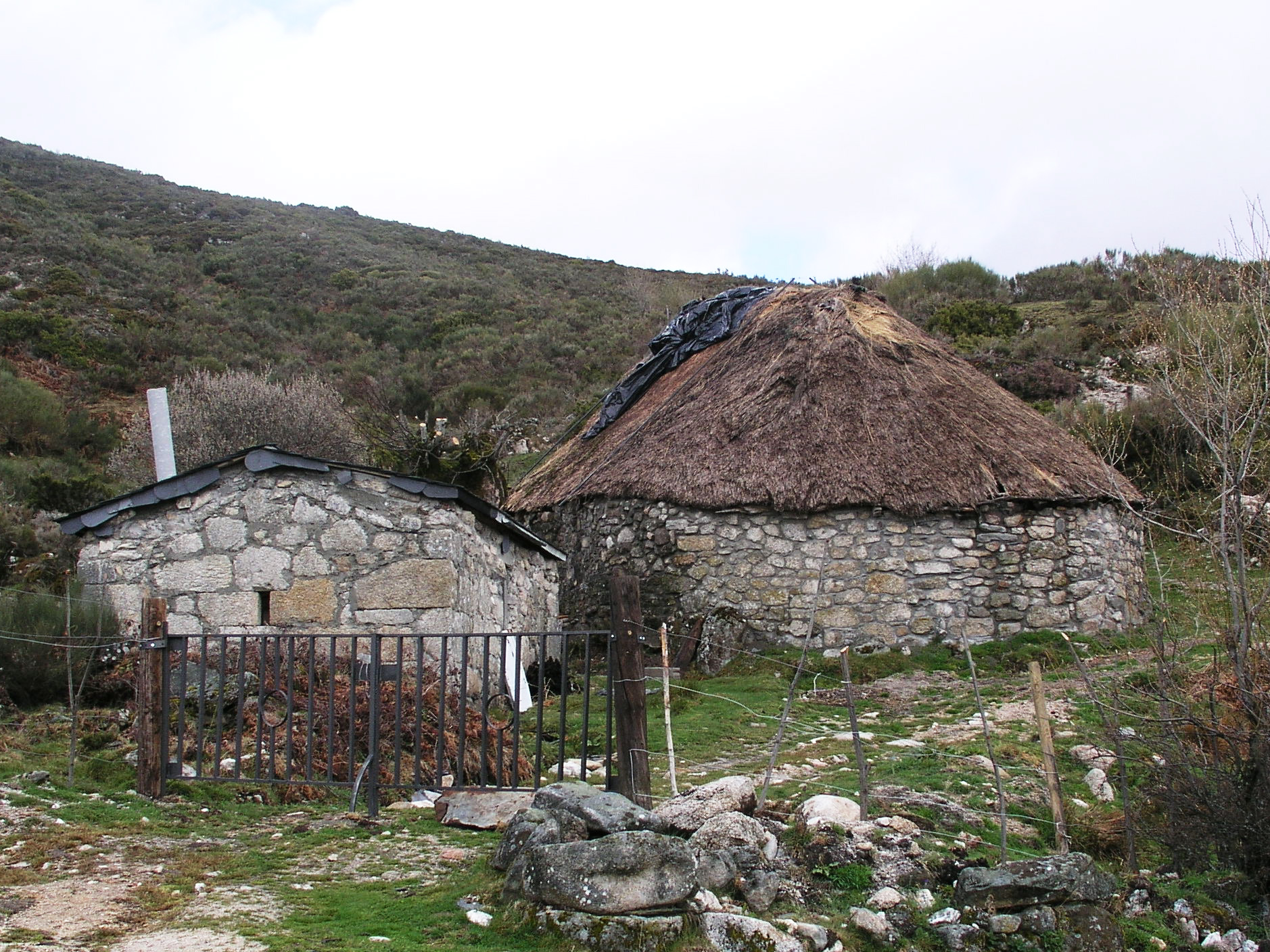 Palloza. Campo del Agua, Villafranca del Bierzo. El Bierzo, León, España.